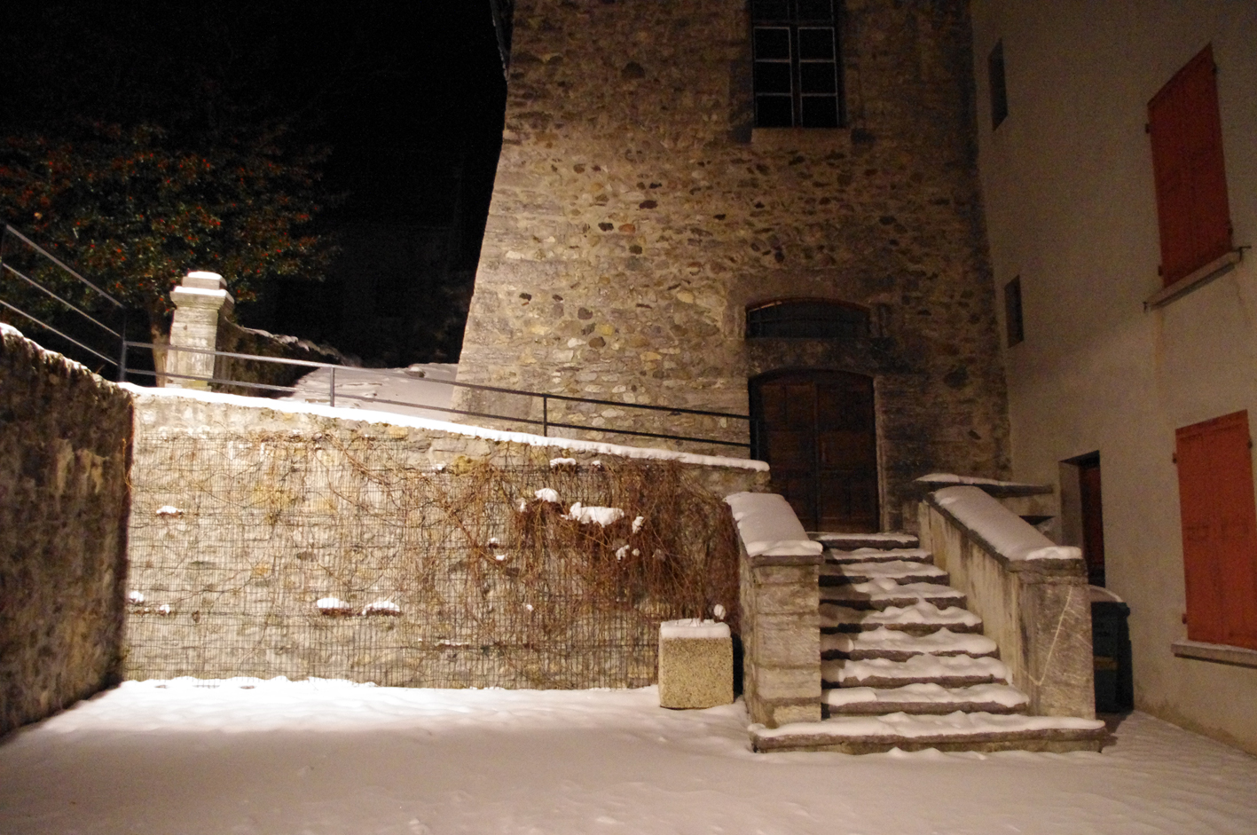 Cour du musée Matheysin, à la Mure (Isère) sous la neige